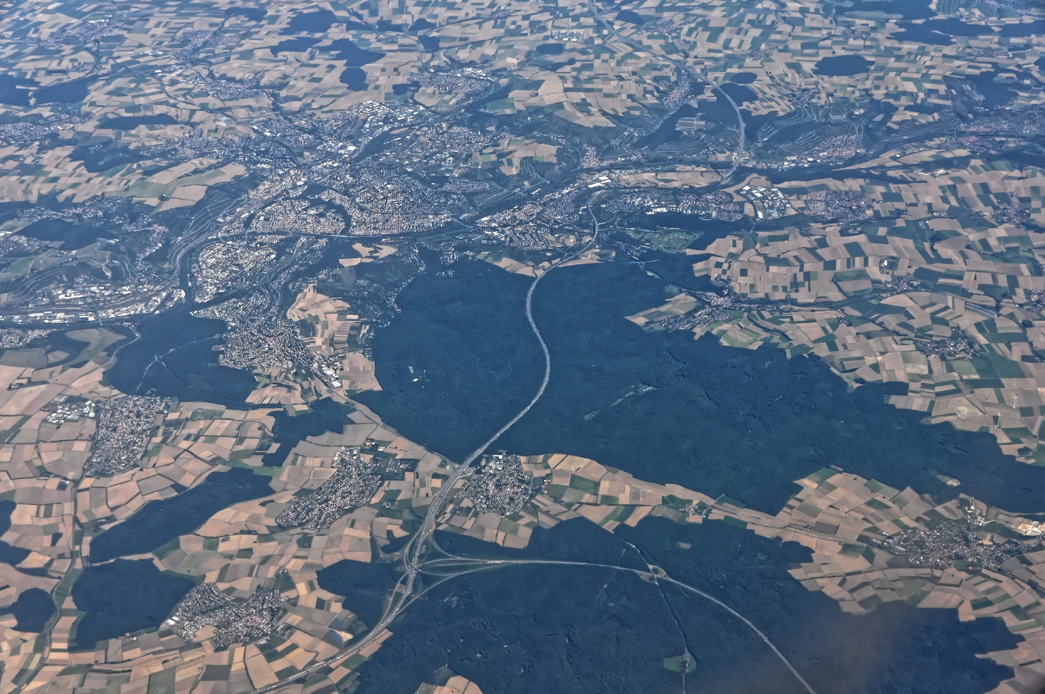 Bilder vom Flug -Rom-Düsseldorf-Hamburg 2013 Dieses Foto entstand in Zusammenarbeit mit Stadtbesichtigungen.de Die Seiten Stadtbesichtigungen.de, der dazugehörige Reise Blog sowie die Facebookseite: Stadtbesichtigungen Rom dürfen dieses Bild für Ihre Veröffentlichungen ohne den Hinweis auf Wikipedia, Commons bzw der Lizenz verwenden. Die Verantwortlichen habe von mir (Ra Boe) die Originaldaten zur freien Verfügung übermittelt bekommen.